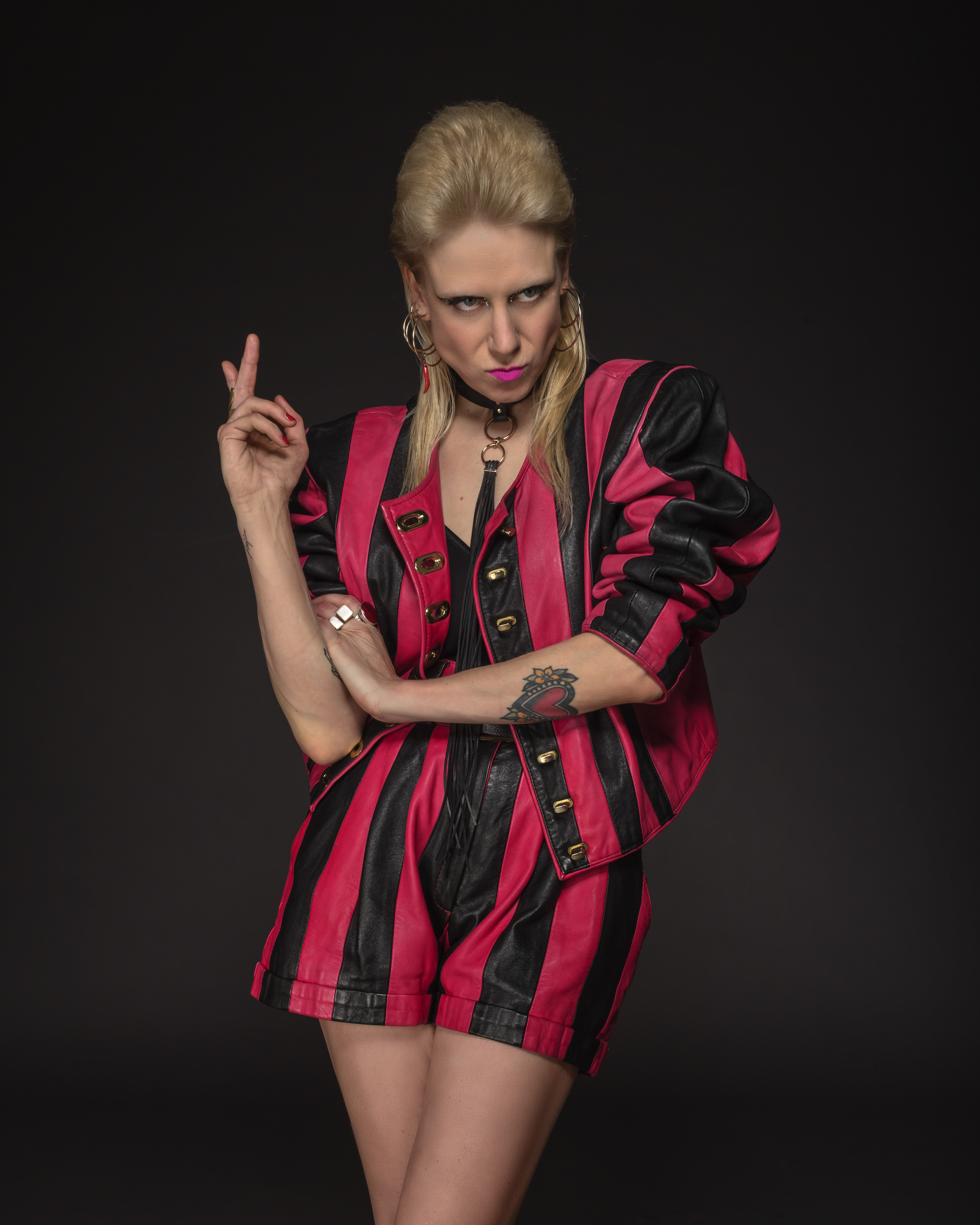 Ankathie Koi, Wien, 2018